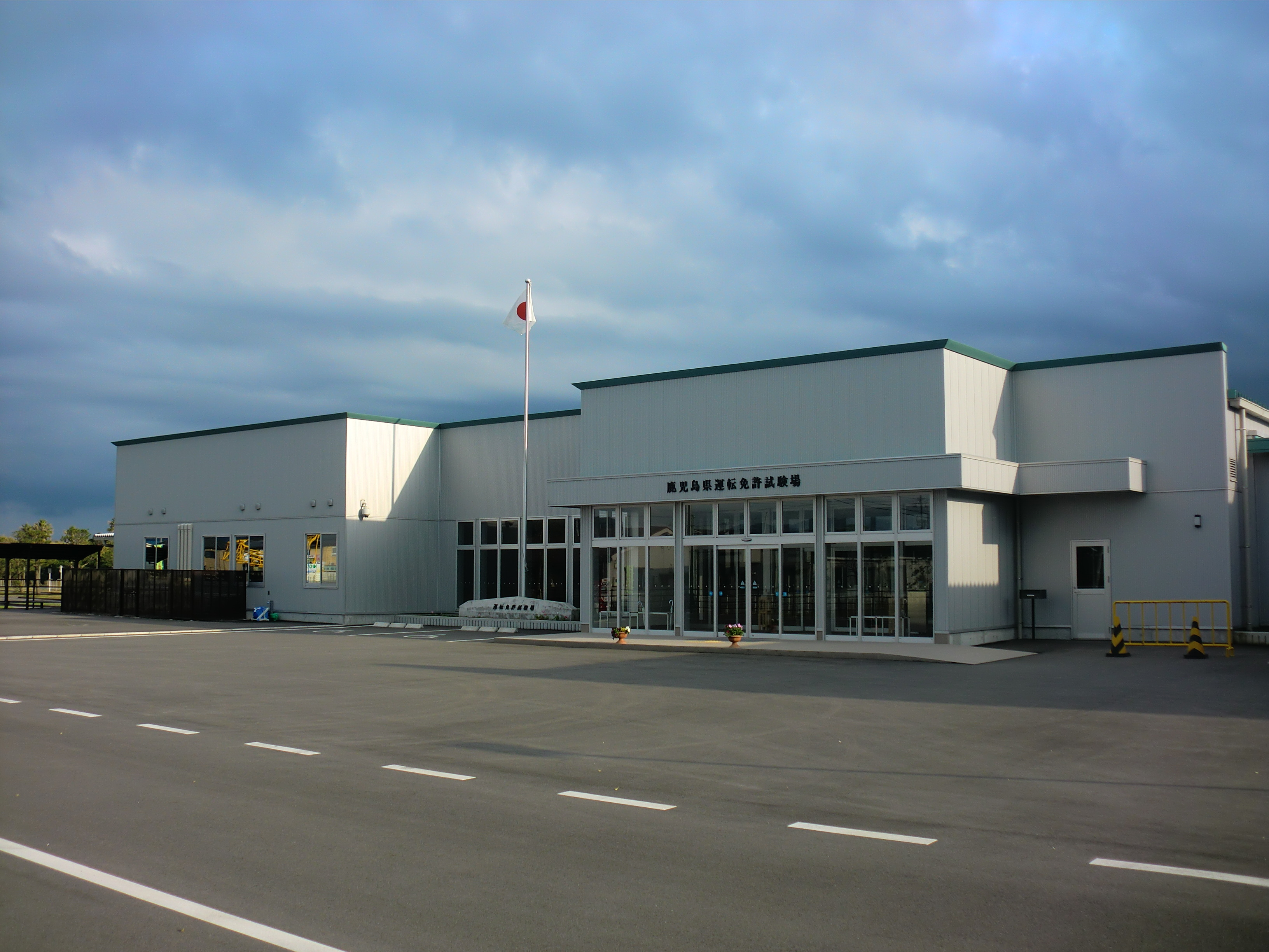 鹿児島県姶良市にある鹿児島県運転免許試験場